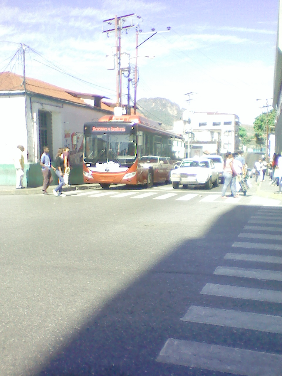 Vista de BusGuarico en el centro de la ciudad